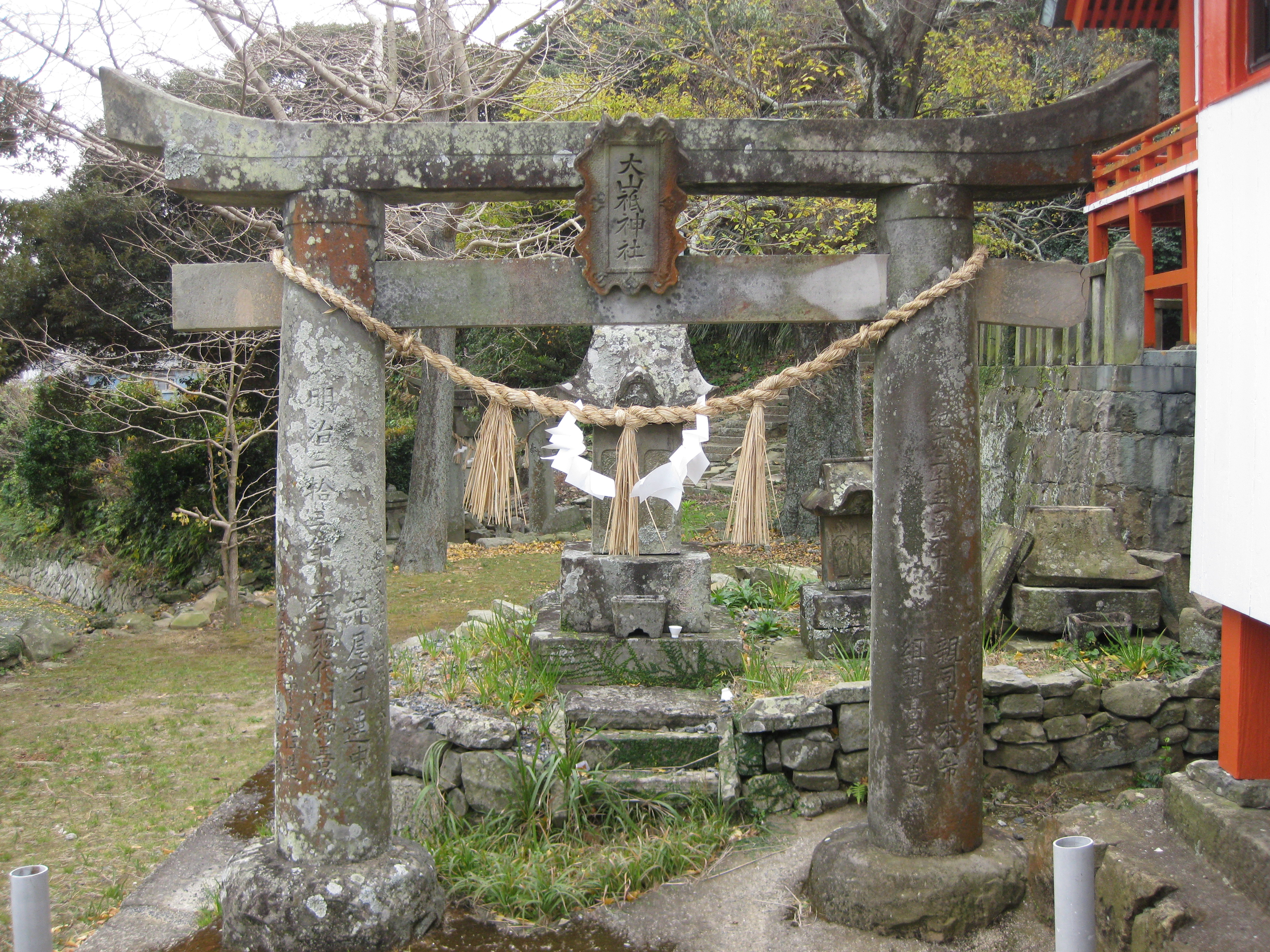 新上五島町 孕神社